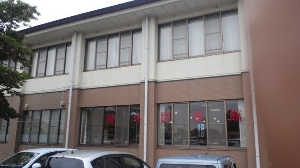 いなべ市員弁図書館。